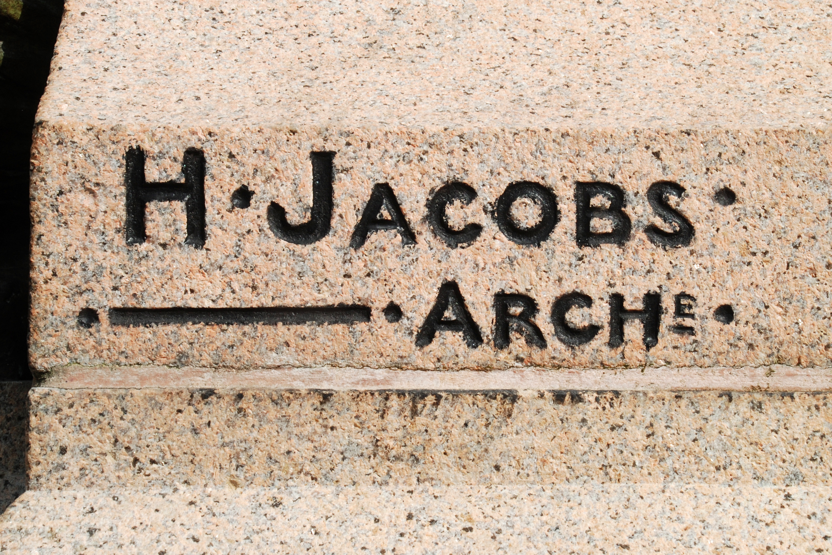 Belgique - Brabant wallon - Court-Saint-Étienne - Monument à Émile Henricot